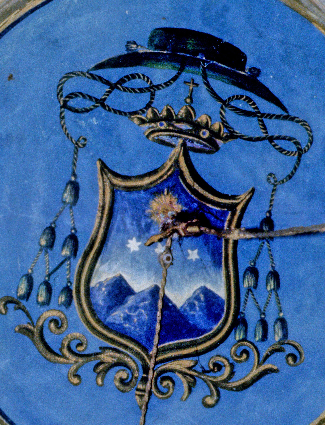 Dalla casa di famiglia a Palazzolo Acreide, soffitto attacco lampadario